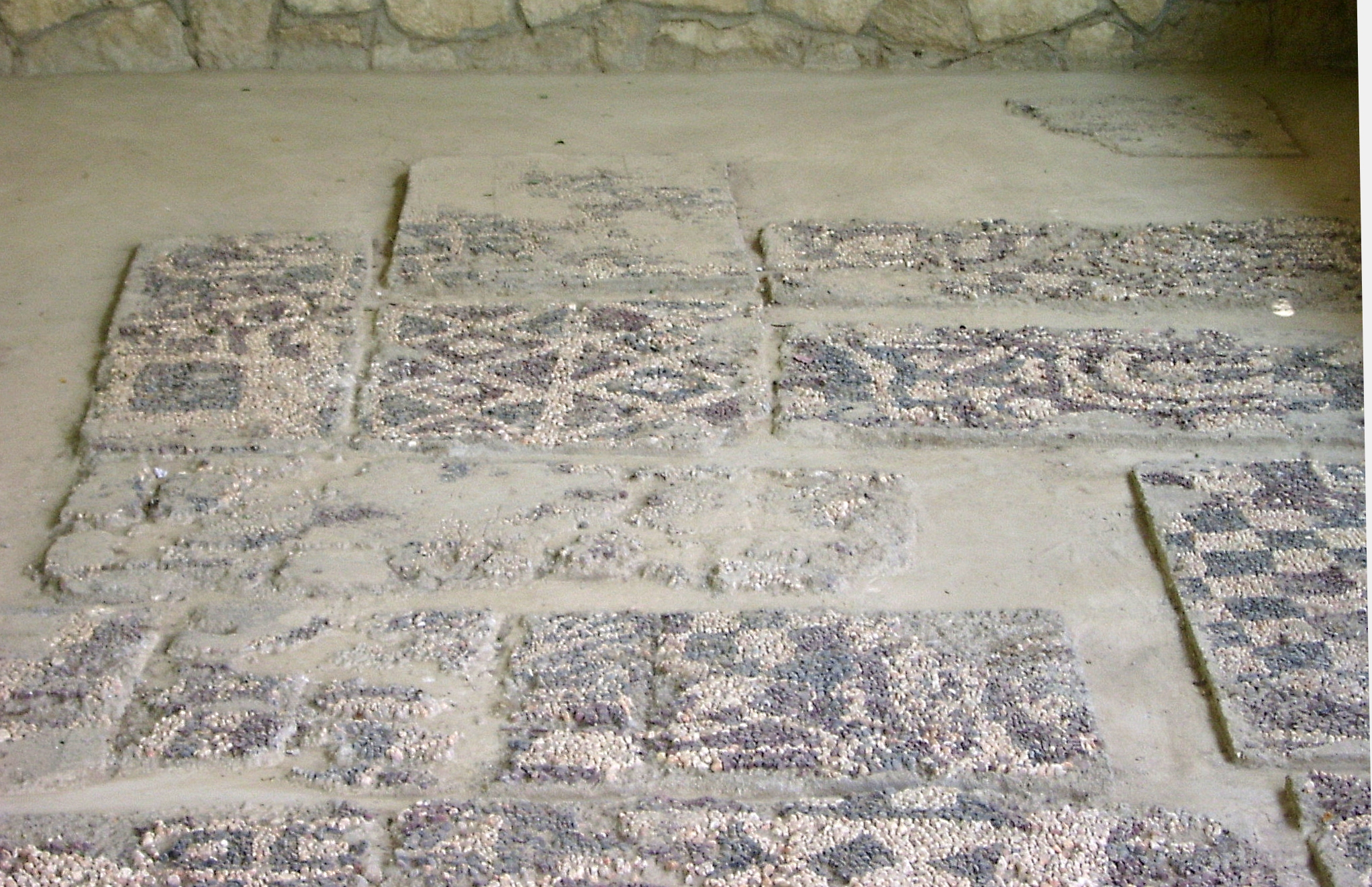 Phrygian pebble mosaic from Gordion Βοτσαλωτό επιδαπέδιο ψηφιδωτό από το Γόρδιον